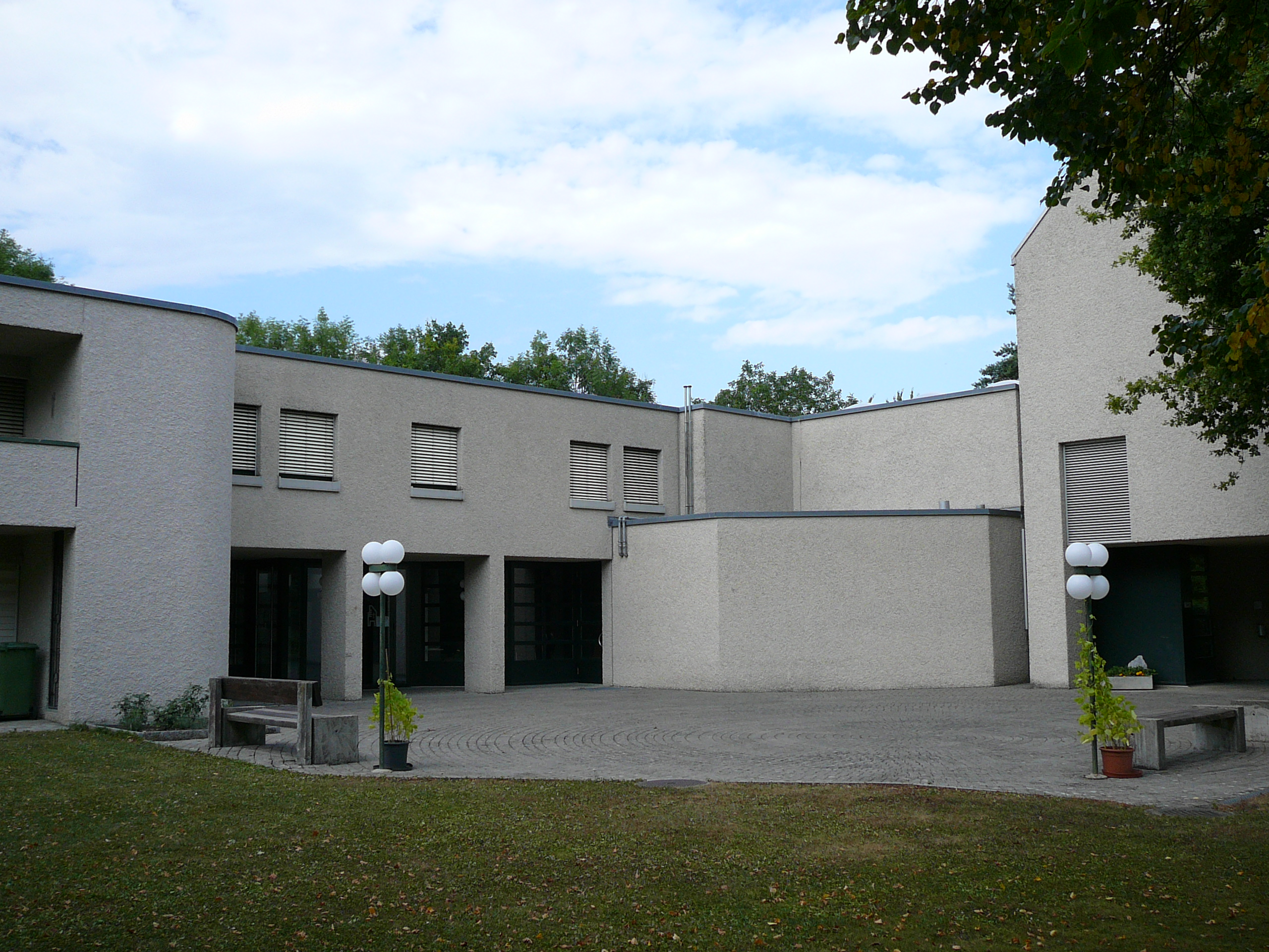 Römisch-katholisches Pfarreizentrum St. Petrus Embrach, Innenhof